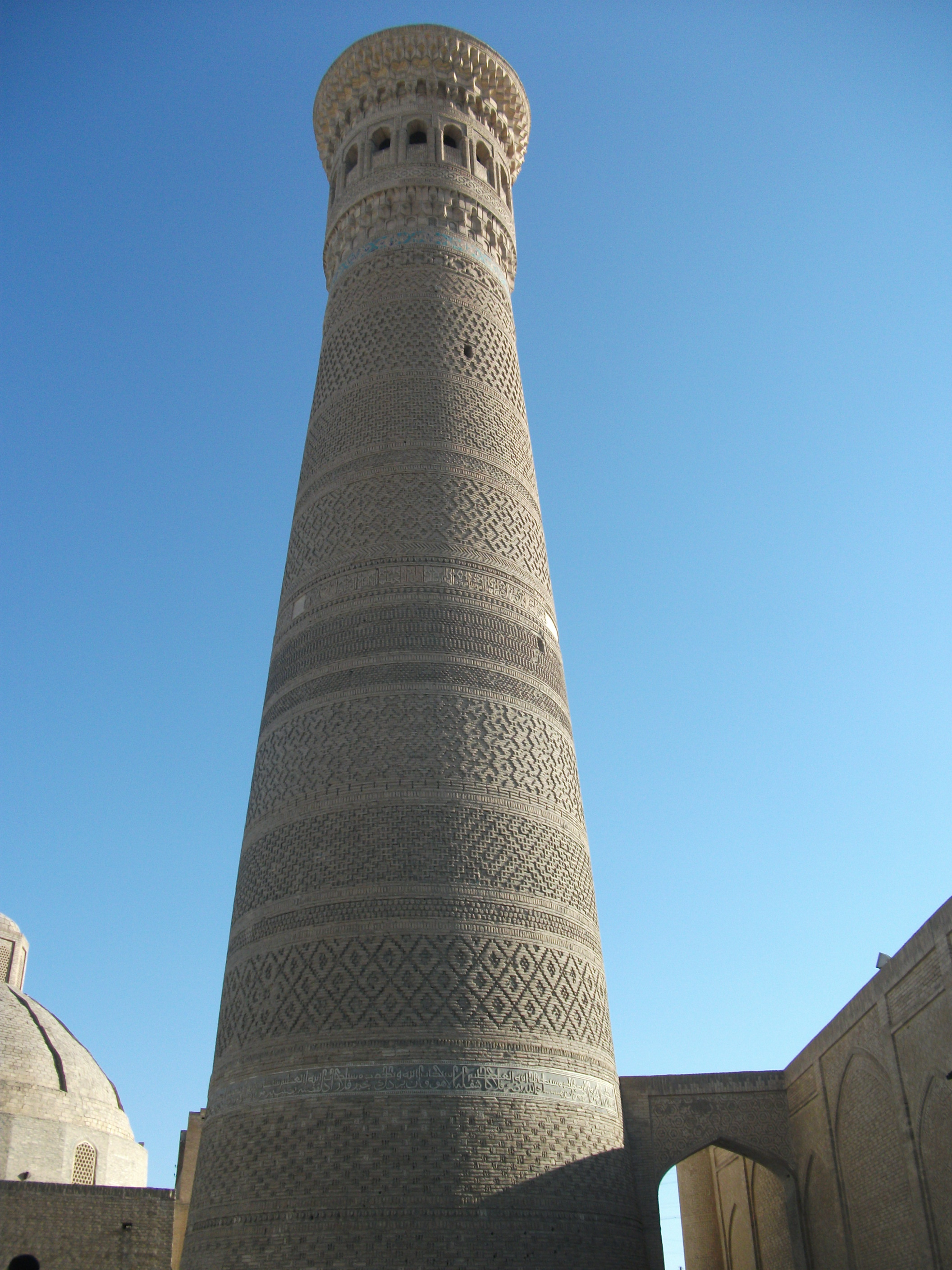 Минарет Калян, Бухара